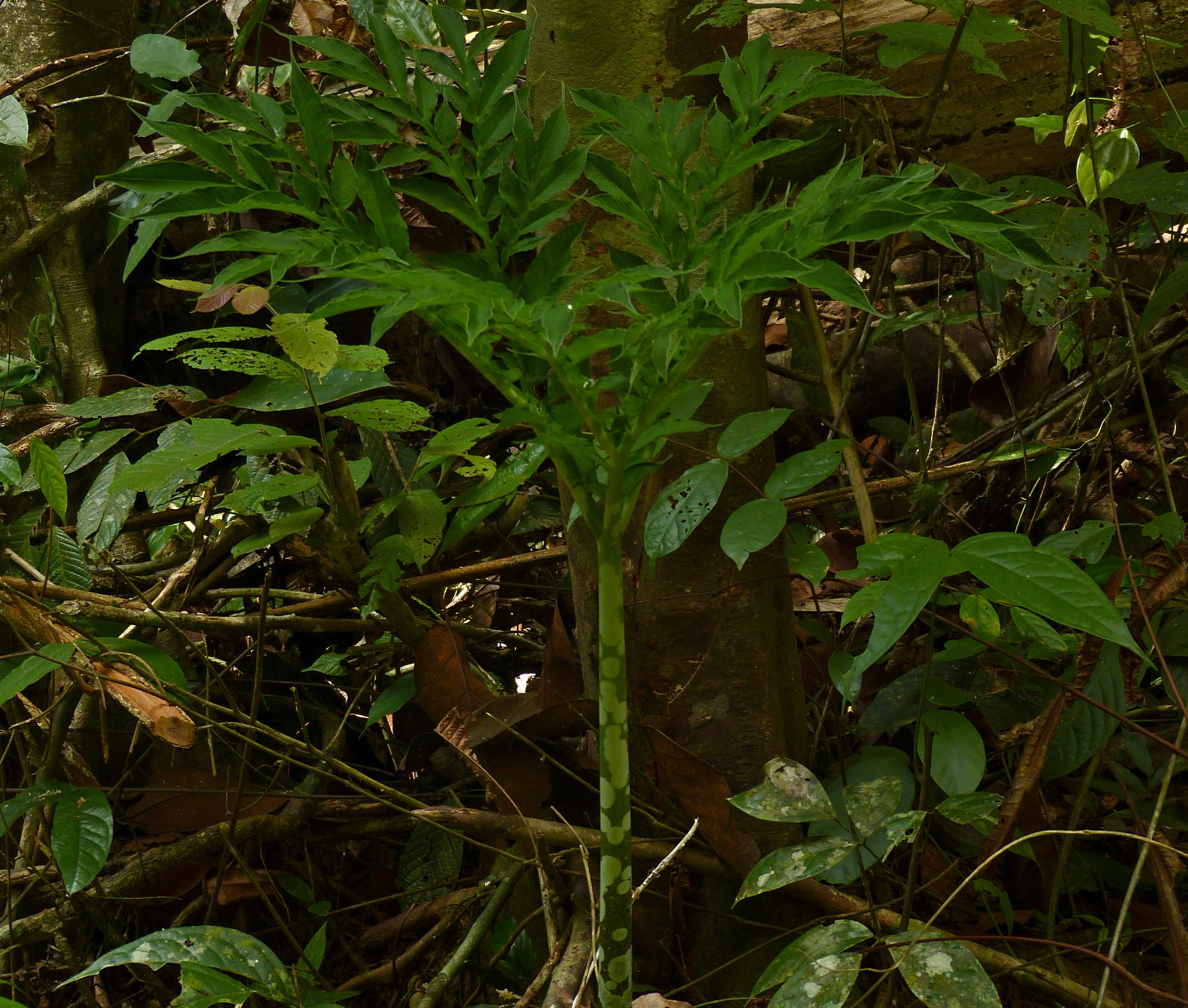 Taman Negara NP, Pahang, MALAYSIA